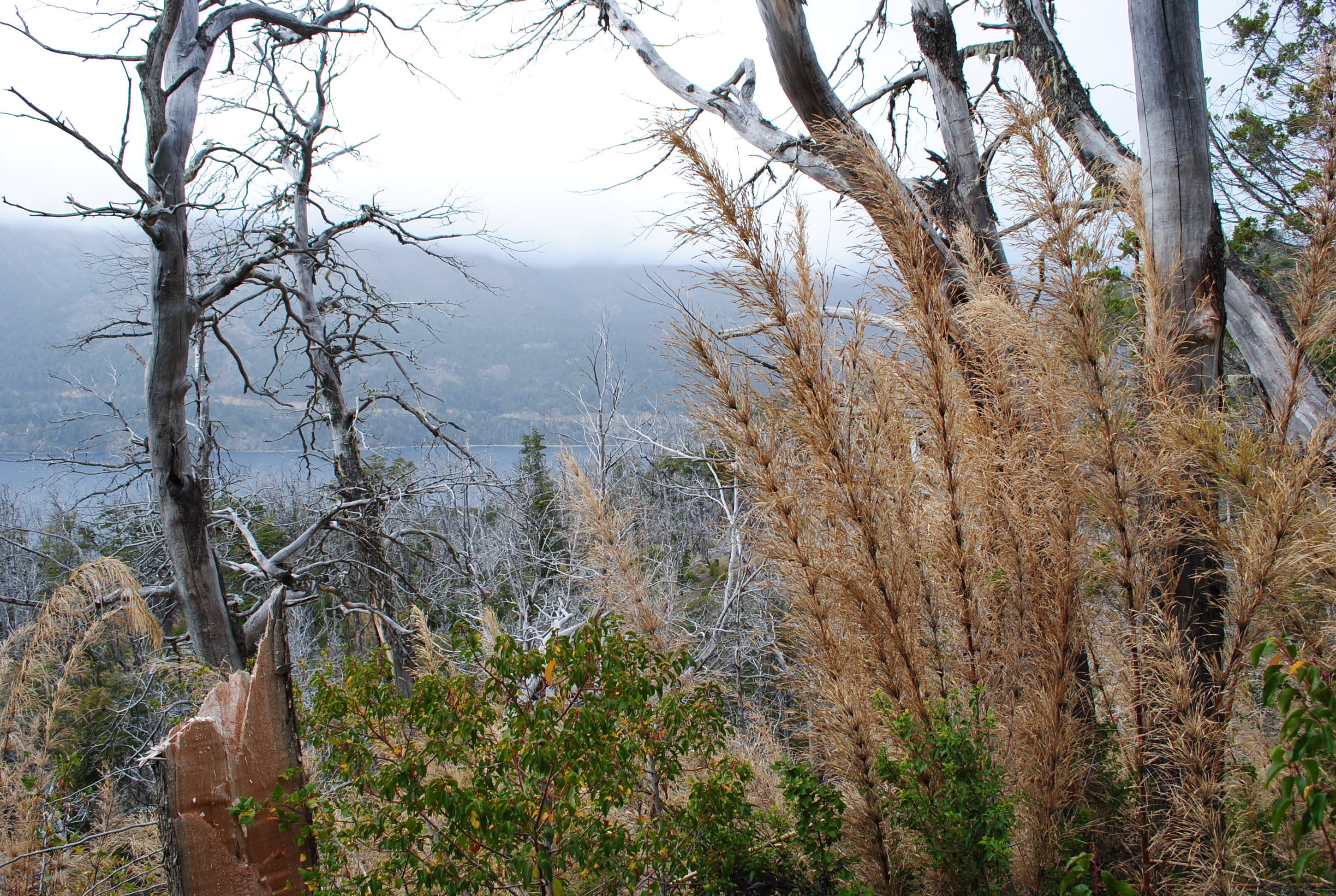 Cañas Colihues Chusquea culeou secas abril 2011, en la picada al refugio Frey, Bariloche, Argentina